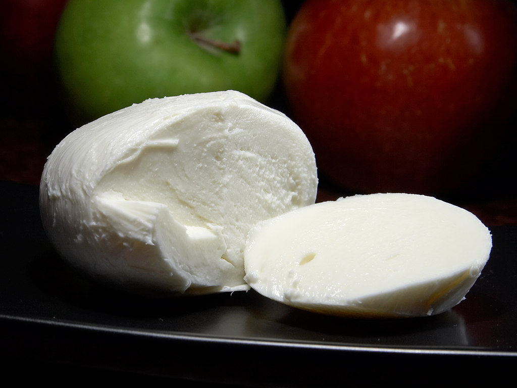 Mozzarella cheese